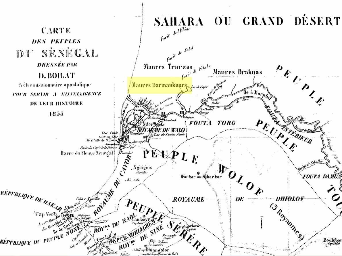 Localisation des Maures Darmanko sur une carte du Sénégal de l'Abbé Boilat, Esquisses sénégalaises, 1853